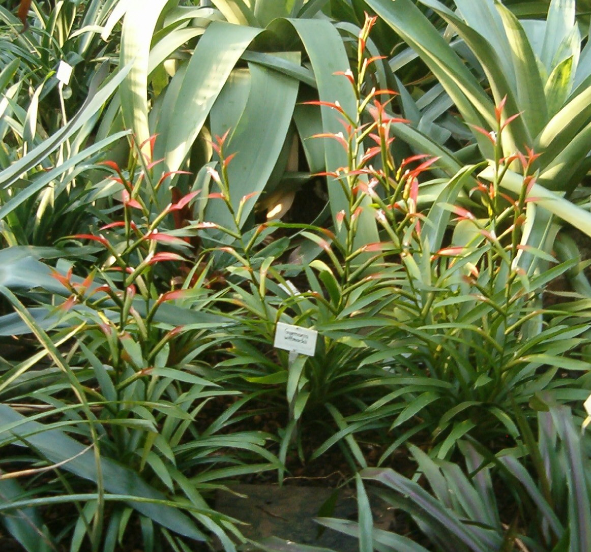 At Botanical Gardens Berlin-Dahlem Species Guzmania wittmackii